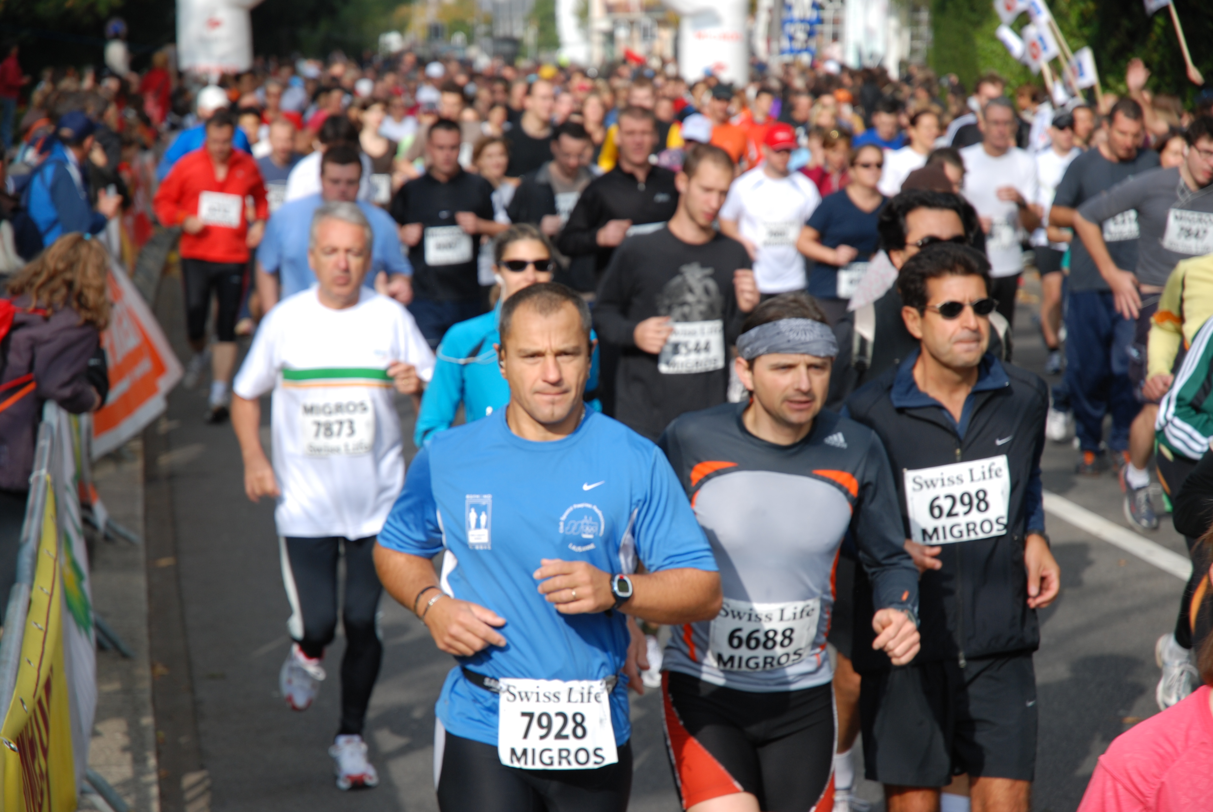 Maratón de Lausanne